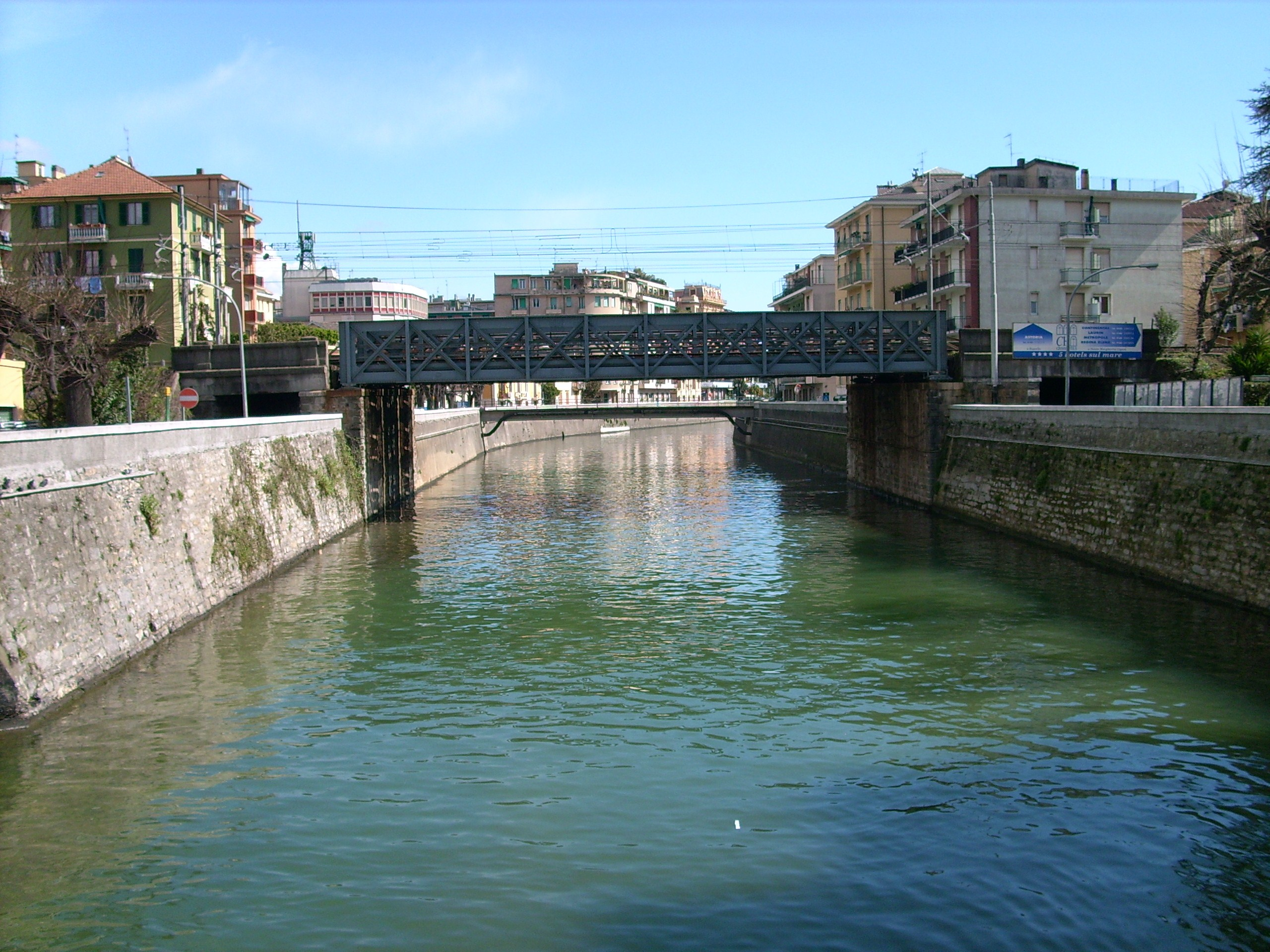 Torrente Boate, Rapallo, Liguria, Italy